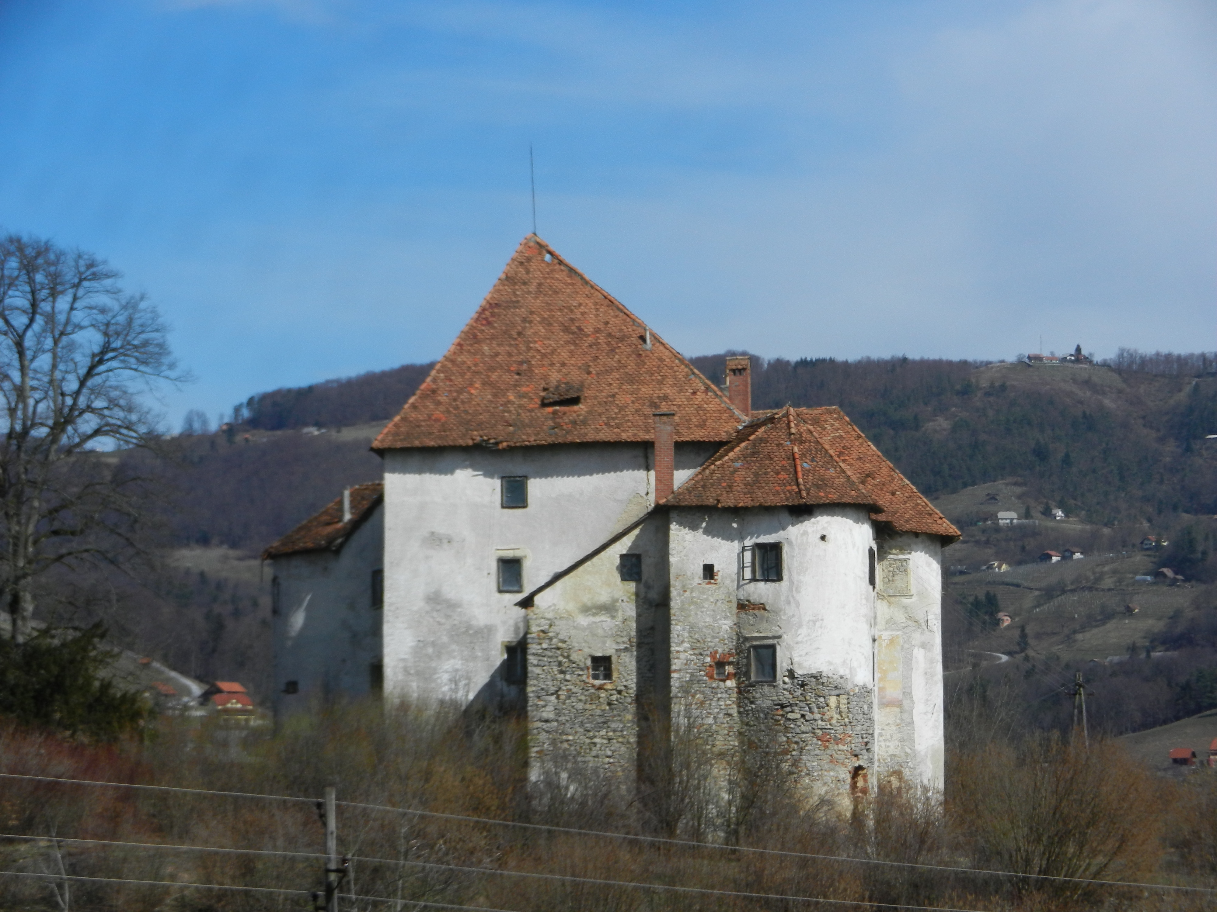 Škrljevo Castle near Šentrupert